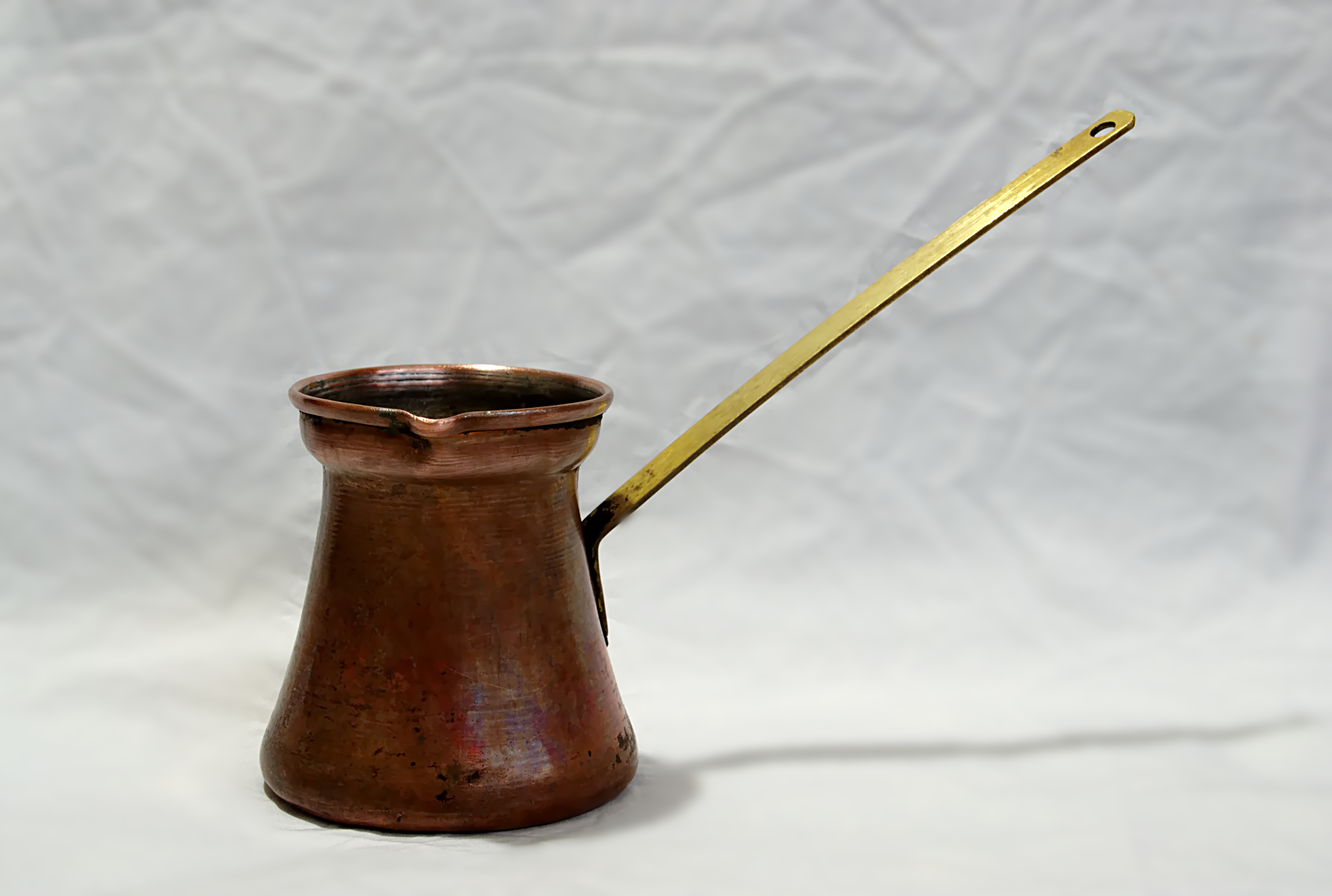 Zazwa : Ustensile en cuivre pour préparer le café turc en Tunisie